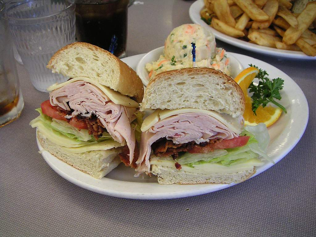 A sandwich.